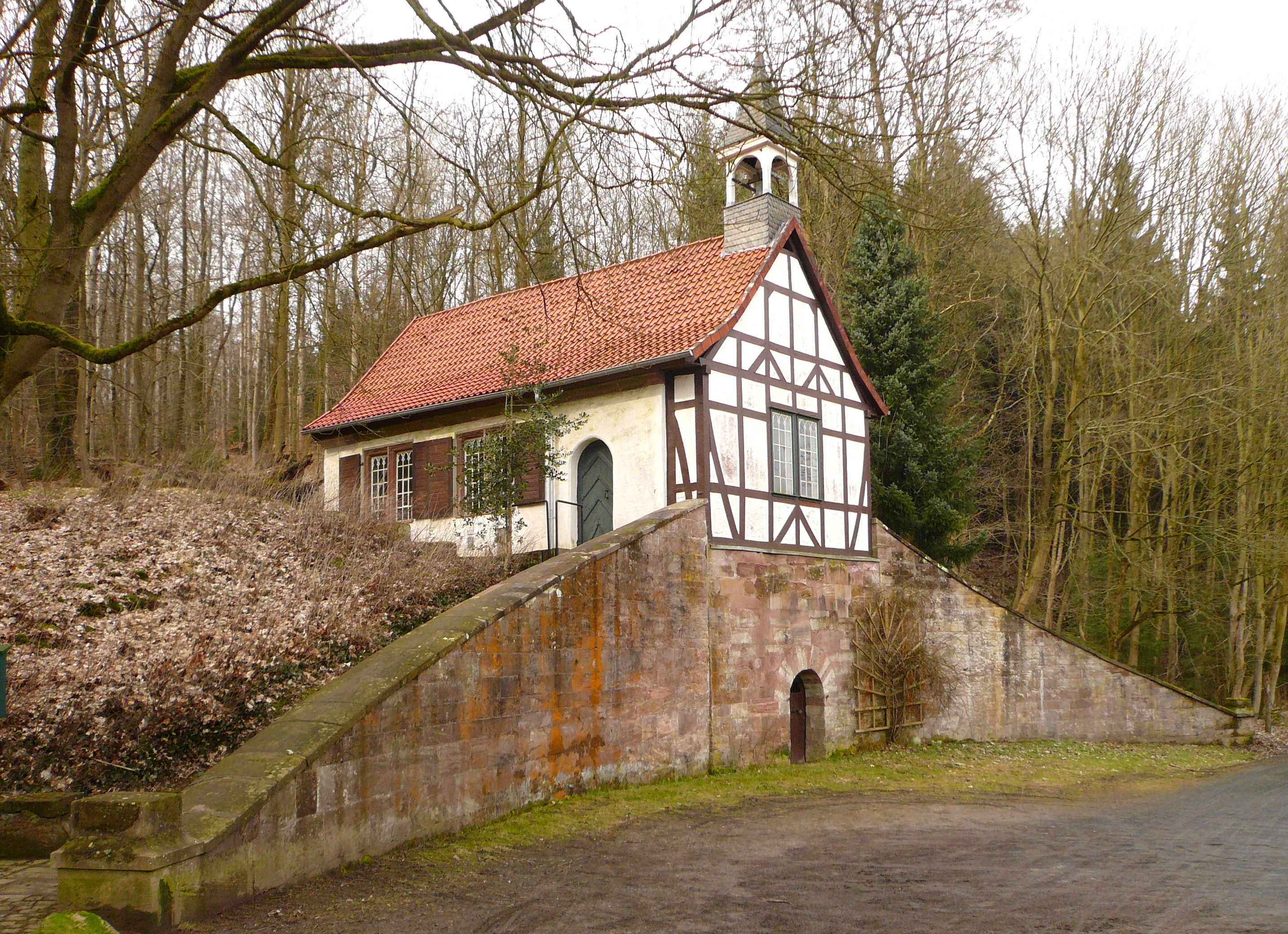 Evangelisch-reformierte Kapelle Wittmarshof bei Benniehausen, Gemeinde Gleichen, Niedersachsen. Erbaut Anfang des 17. Jahrhunderts, Fachwerkgiebelfront und Dachreiter frühes 19. Jahrhundert